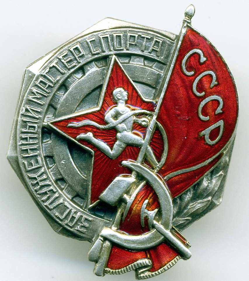 Знак № 47 (аверс) к почётному спортивному званию «Заслуженный мастер спорта СССР», которого был удостоен 10.XII.1936 боксёр В. П. Михайлов